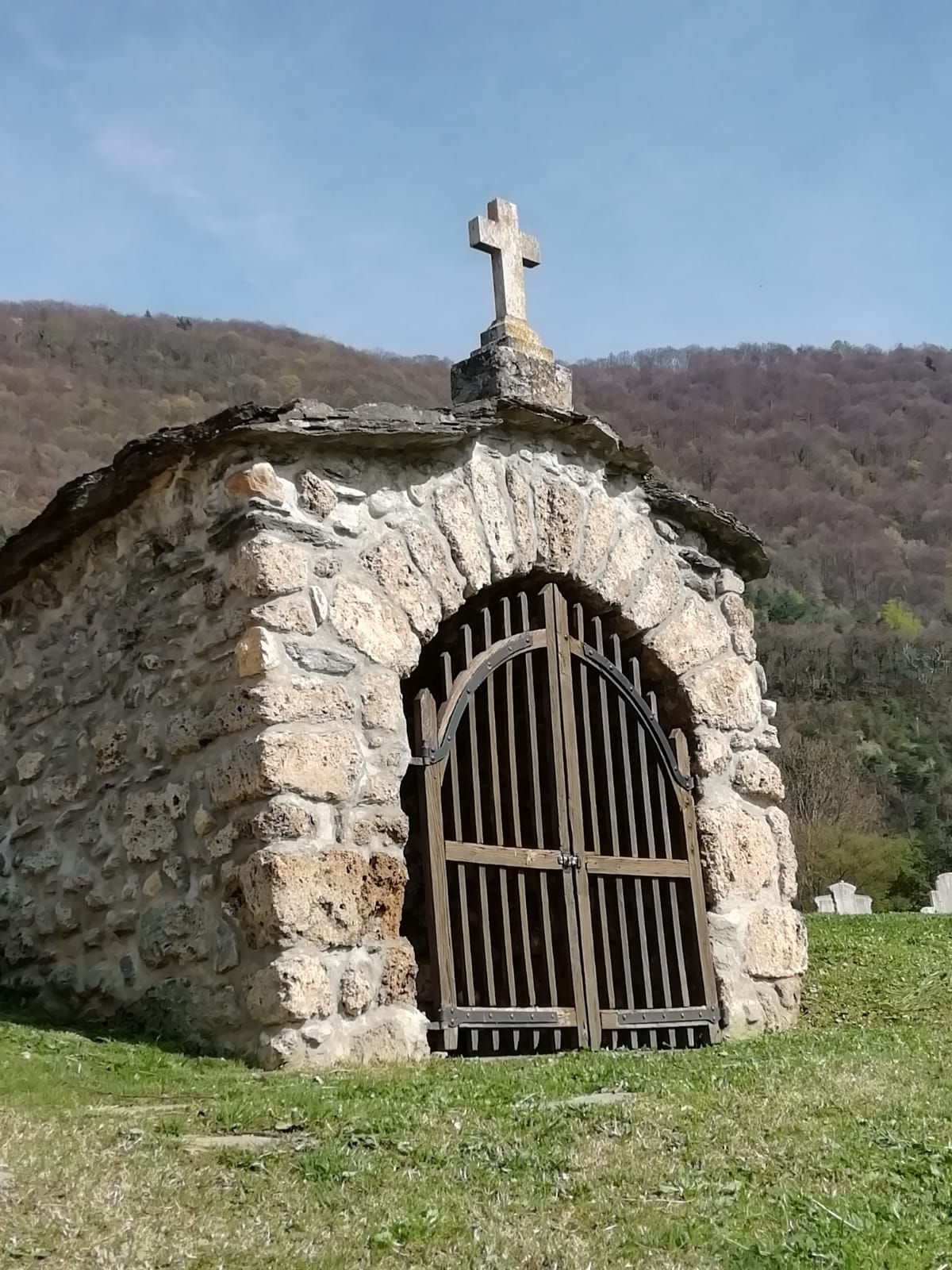 Oratoire de Saint Pierre, se situe près de l'Eglise de Saint Pierre de Commiers